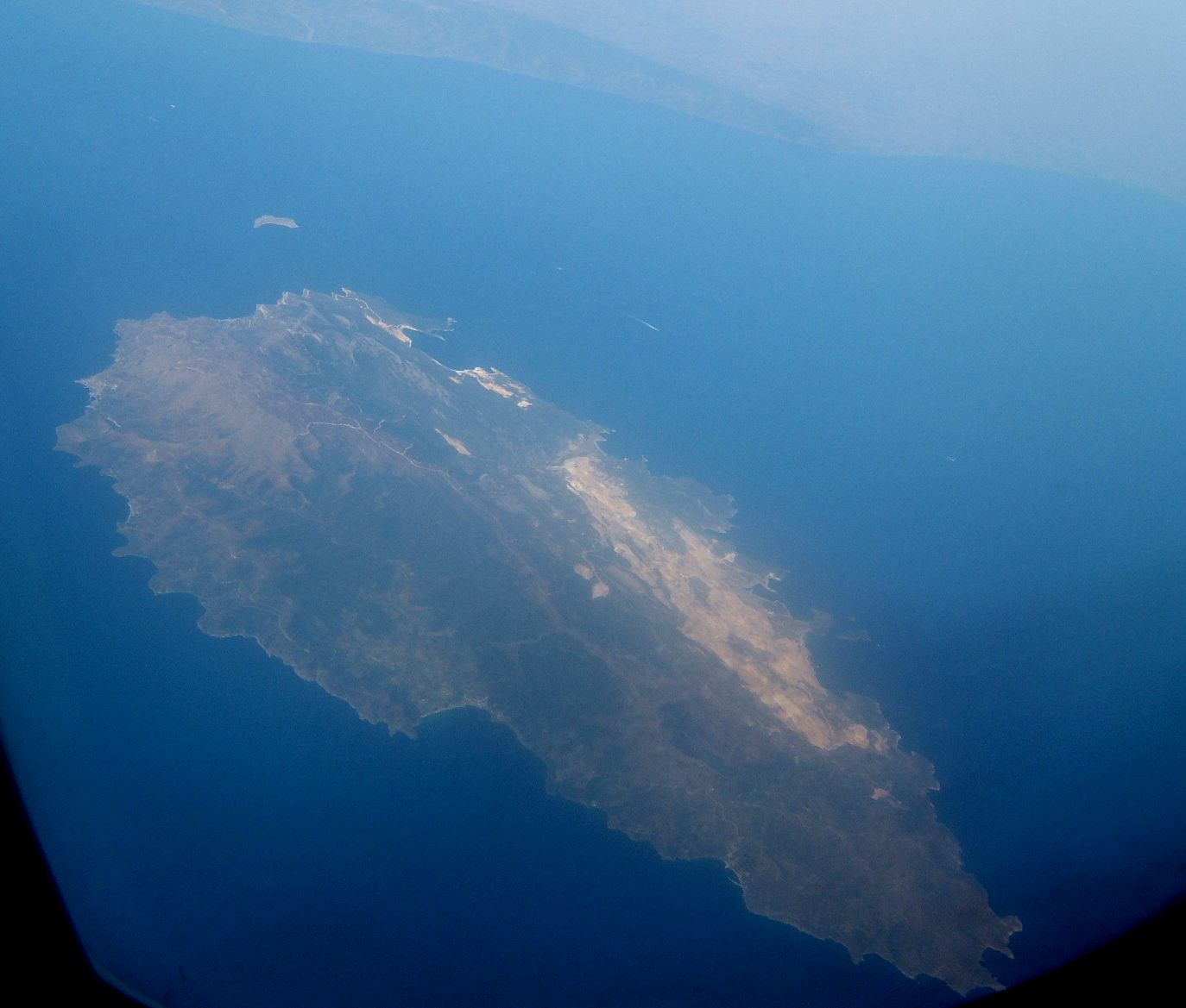 Marmara Island, Turkey (Marmara Sea)